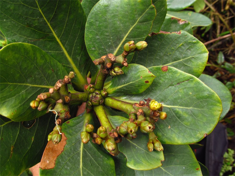 Aguacatillo blanco (Persea mutisii) en Usme, Bogotá, Colombia.